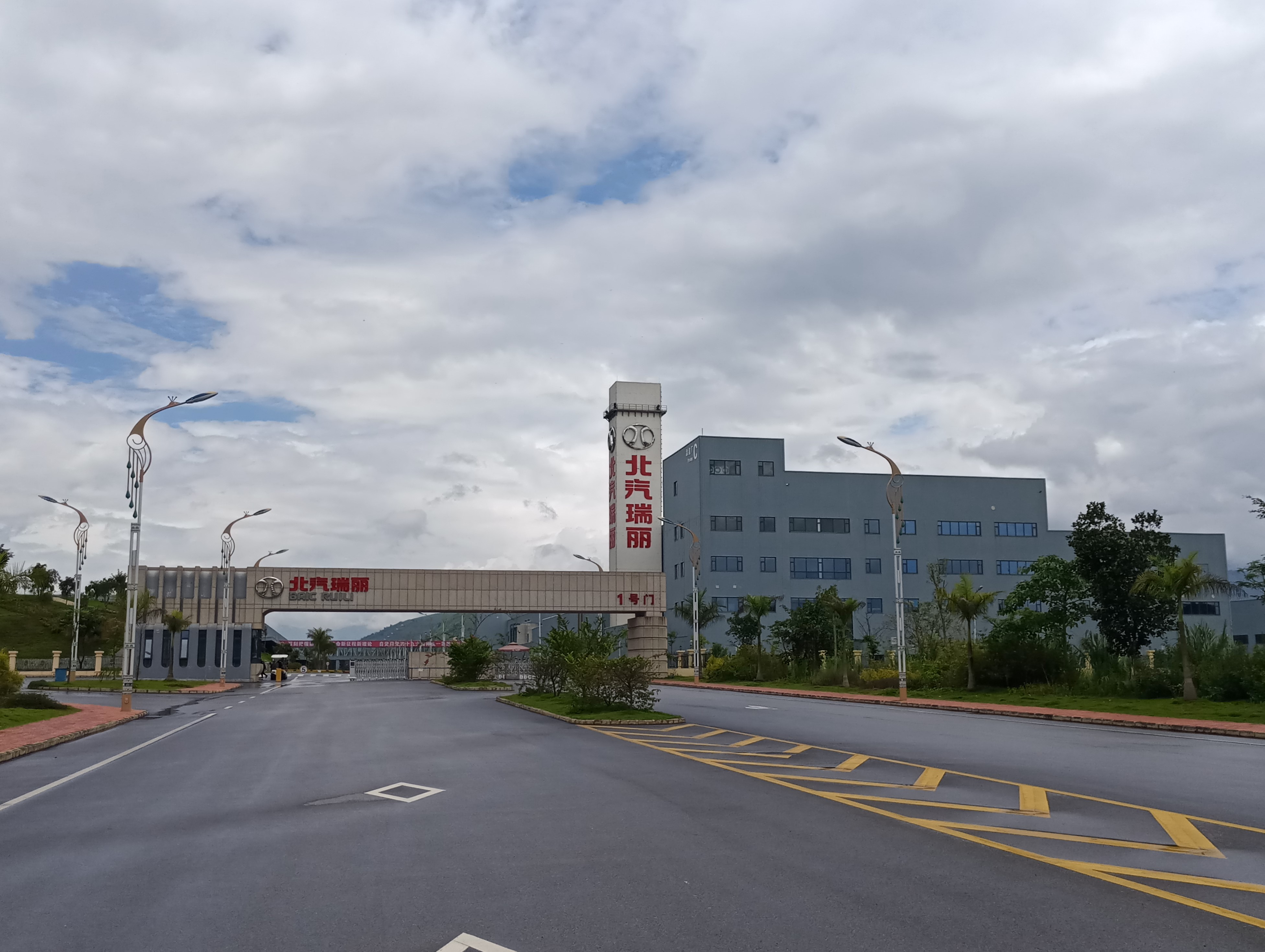 北汽瑞丽工厂